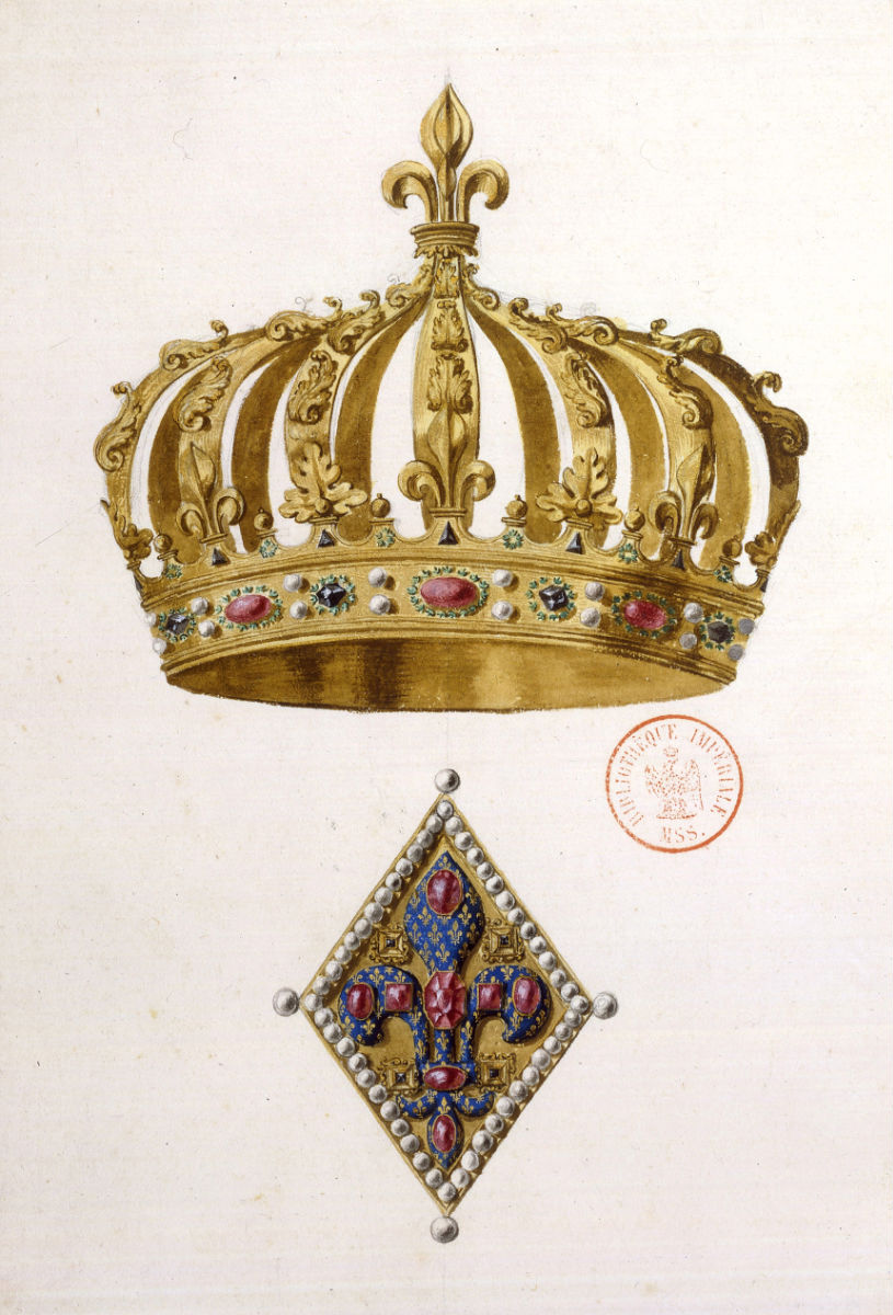 La couronne d'Henri IV à été décrite dans le sujet sur la planche I de Félibien elle porte la lettre NA ; le fermail lui est repris dans la planche IV avec la lettre L.